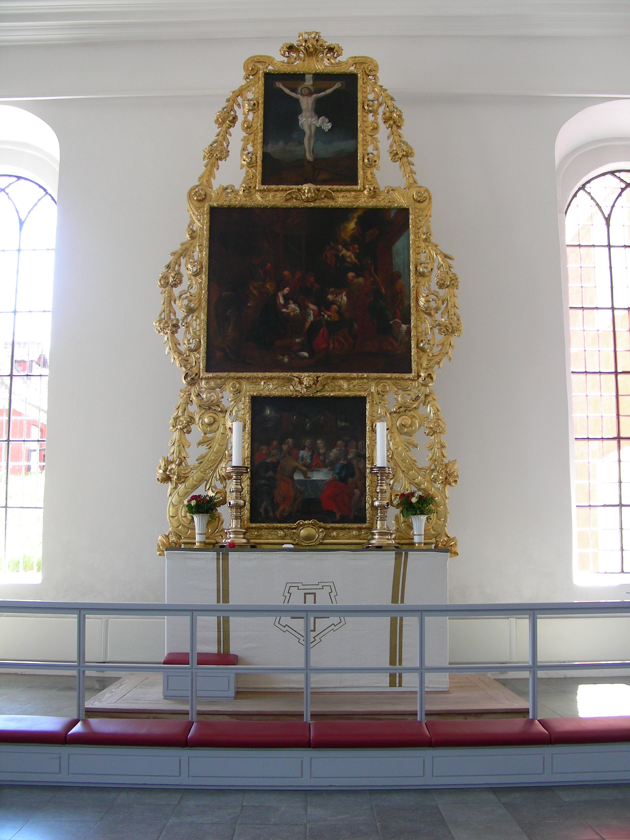 Kastelskirken (Citadel Church), Copenhagen, Denmark. Altar.